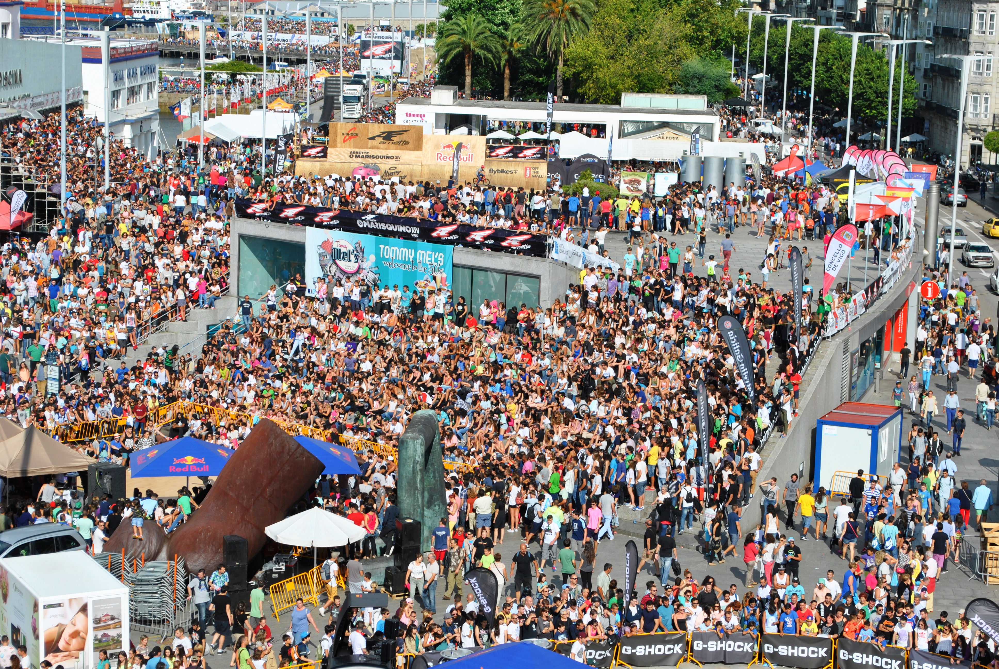 Vexa o título e as categorías.